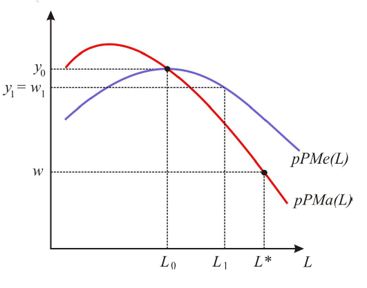 Figura 1: Modelo de Ward-Domar-Vanek de empresa autogestionada. Tomado de diapositivas de A. Dean